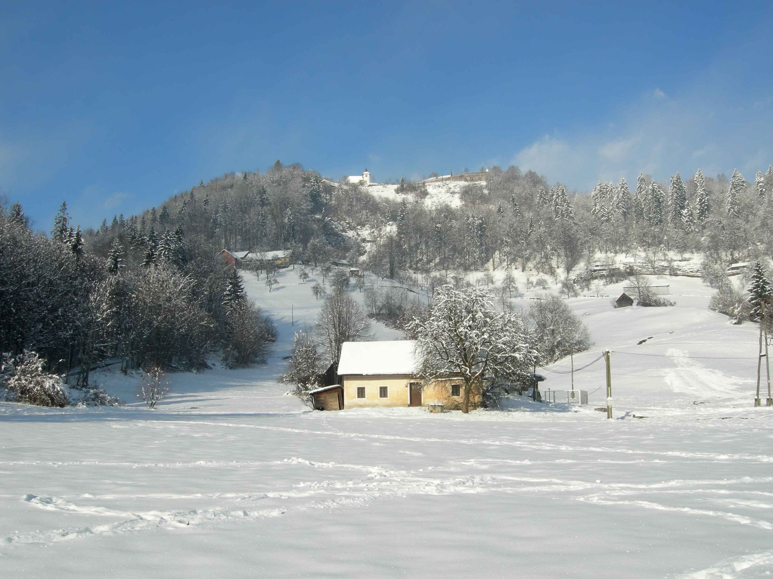 Šmarjetna gora, Stražišče pri Kranju